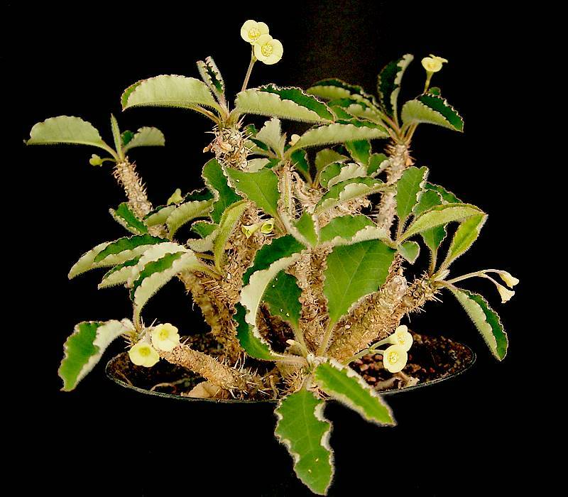 Euphorbia razafindratsirae